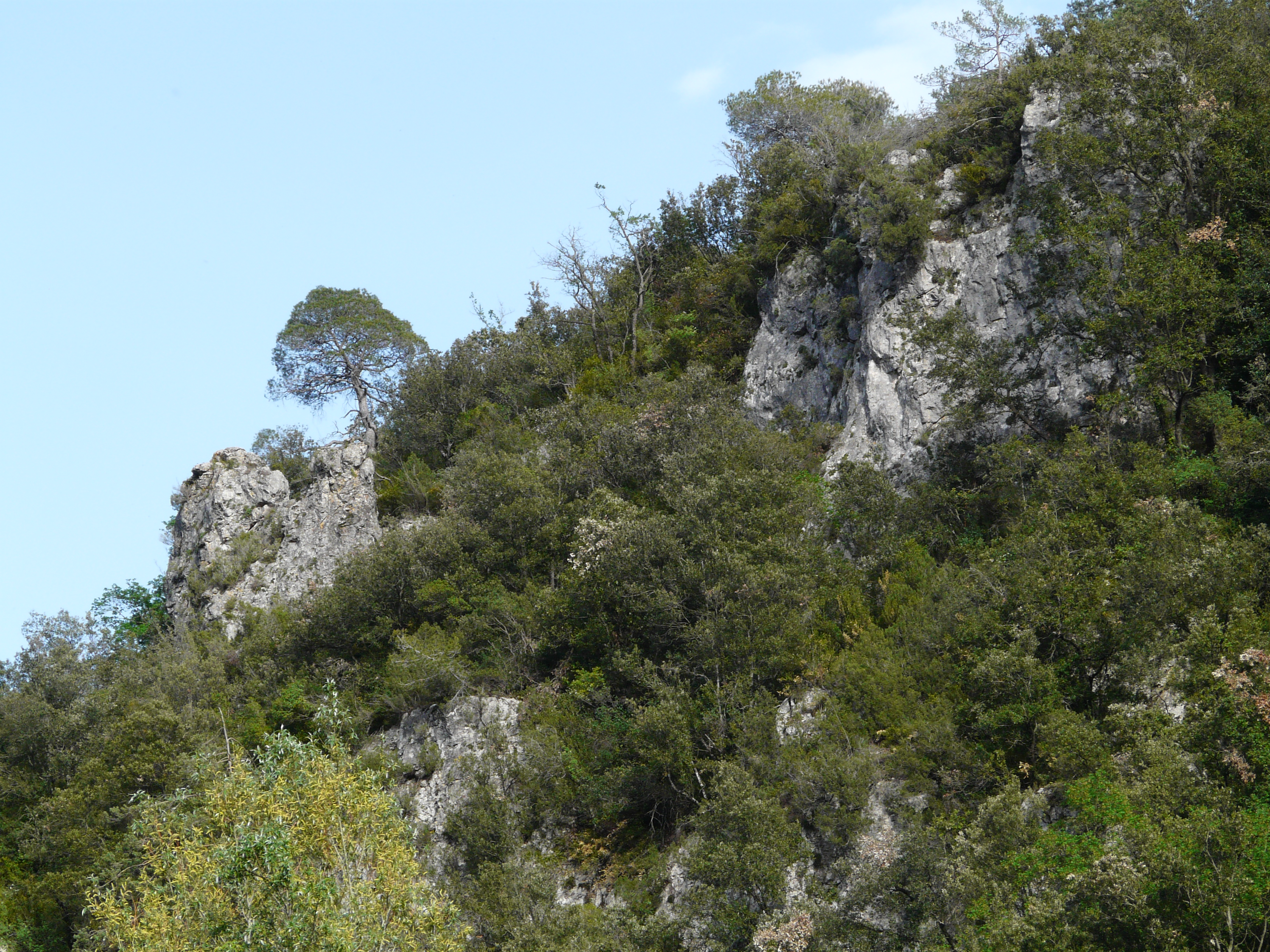 Muntanyes de Prades (Baix Camp, Conca de Barberà, Alt Camp, Priorat, Garrigues) (Montblanc, Vimbodí, Mont-ral i altres). This is a a photo of a natural area in Catalonia, Spain, with id: ES510143 Object location41° 18′ 36″ N, 1° 01′ 48″ E